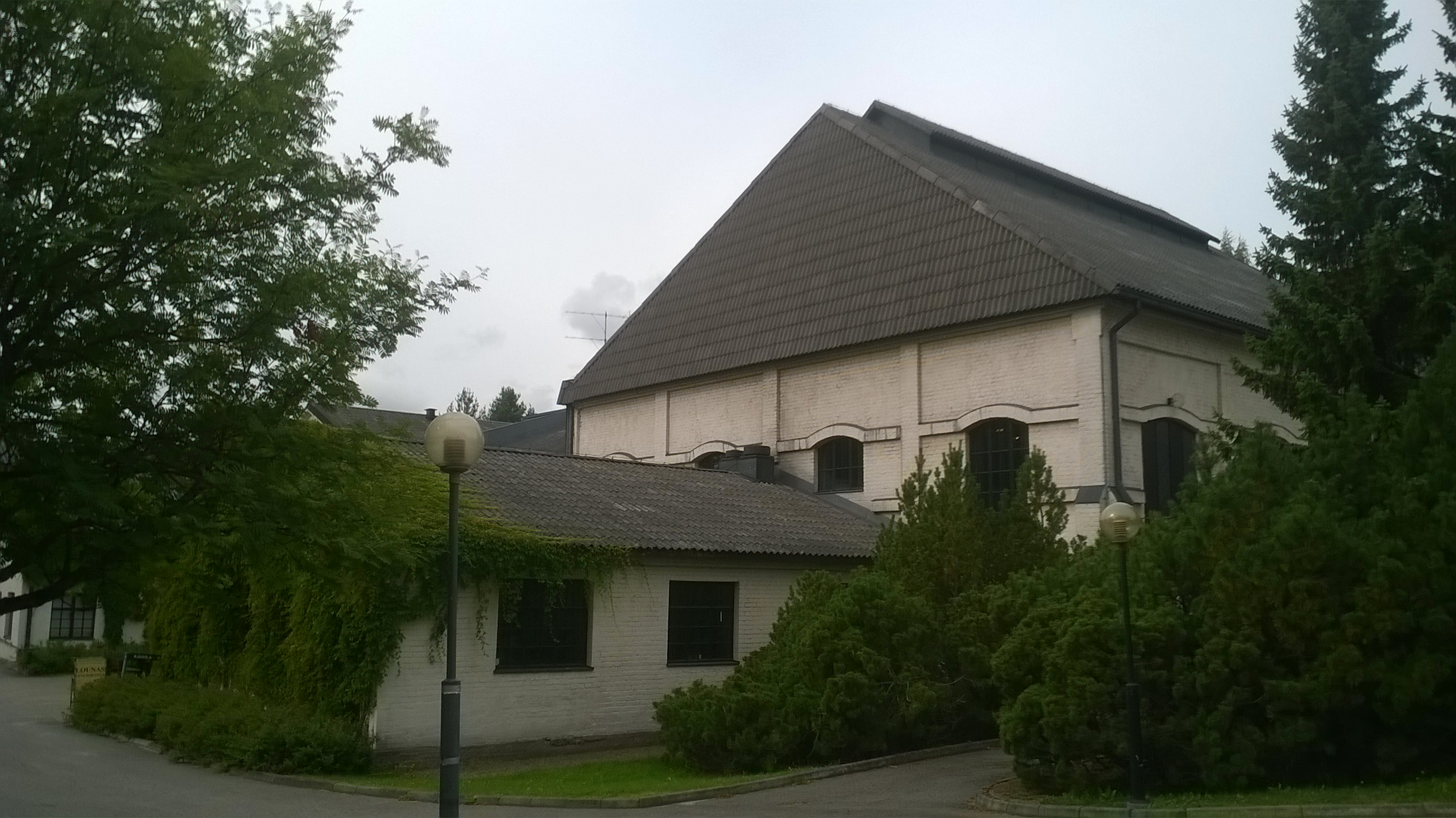 Suomen lasimuseo